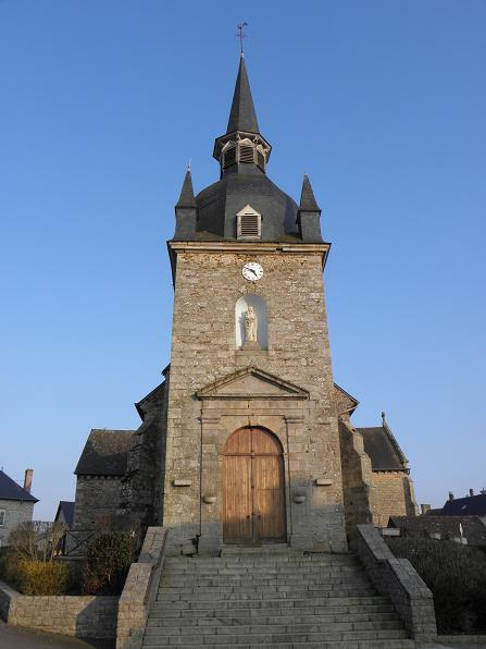 Église Saint-Pierre de Quédillac (35).